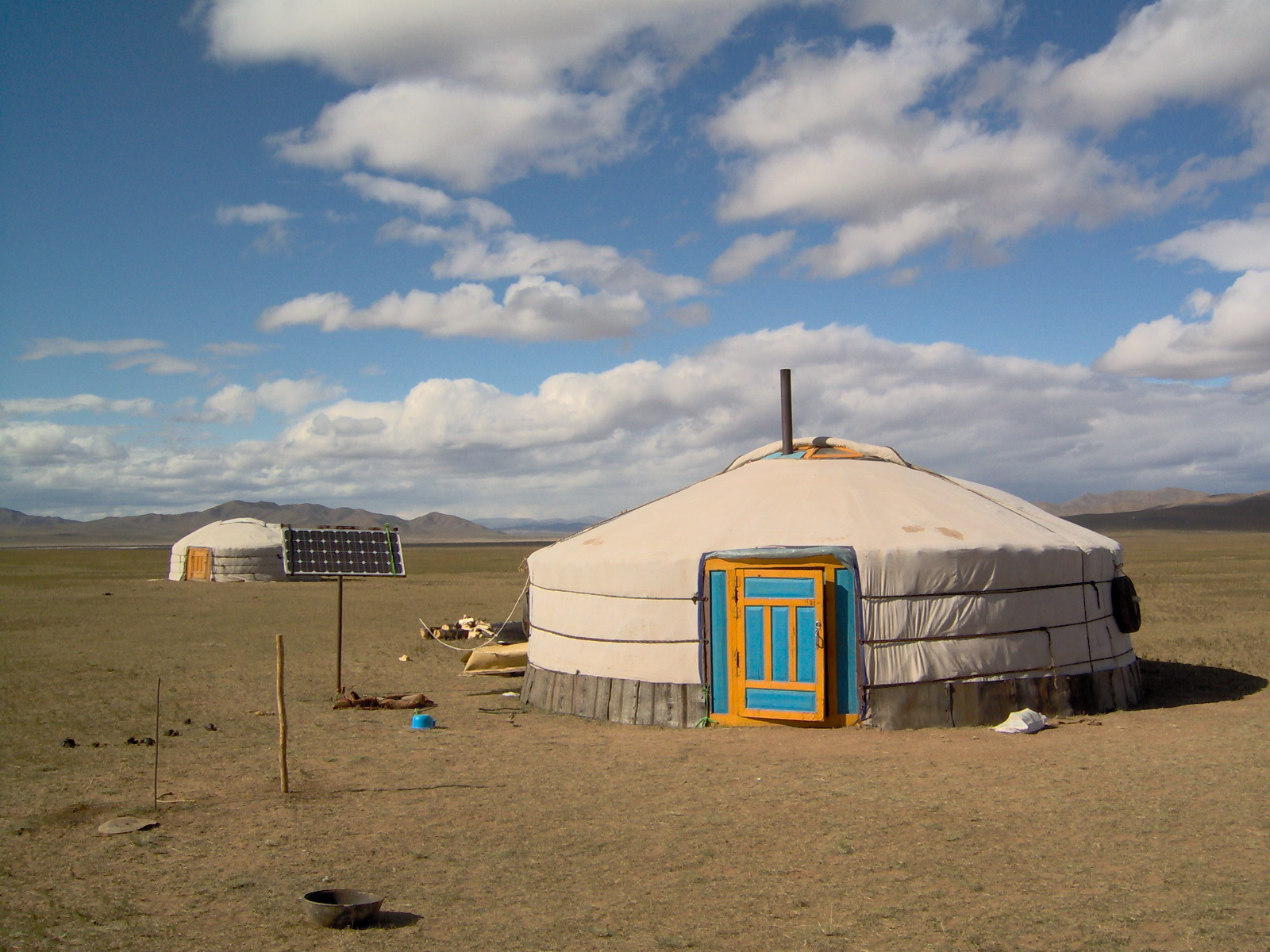 Ger, Mongolia